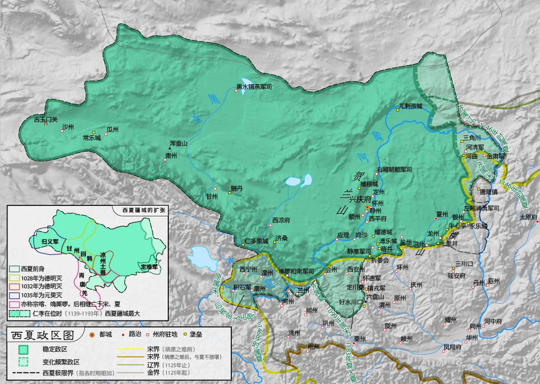 西夏全境图